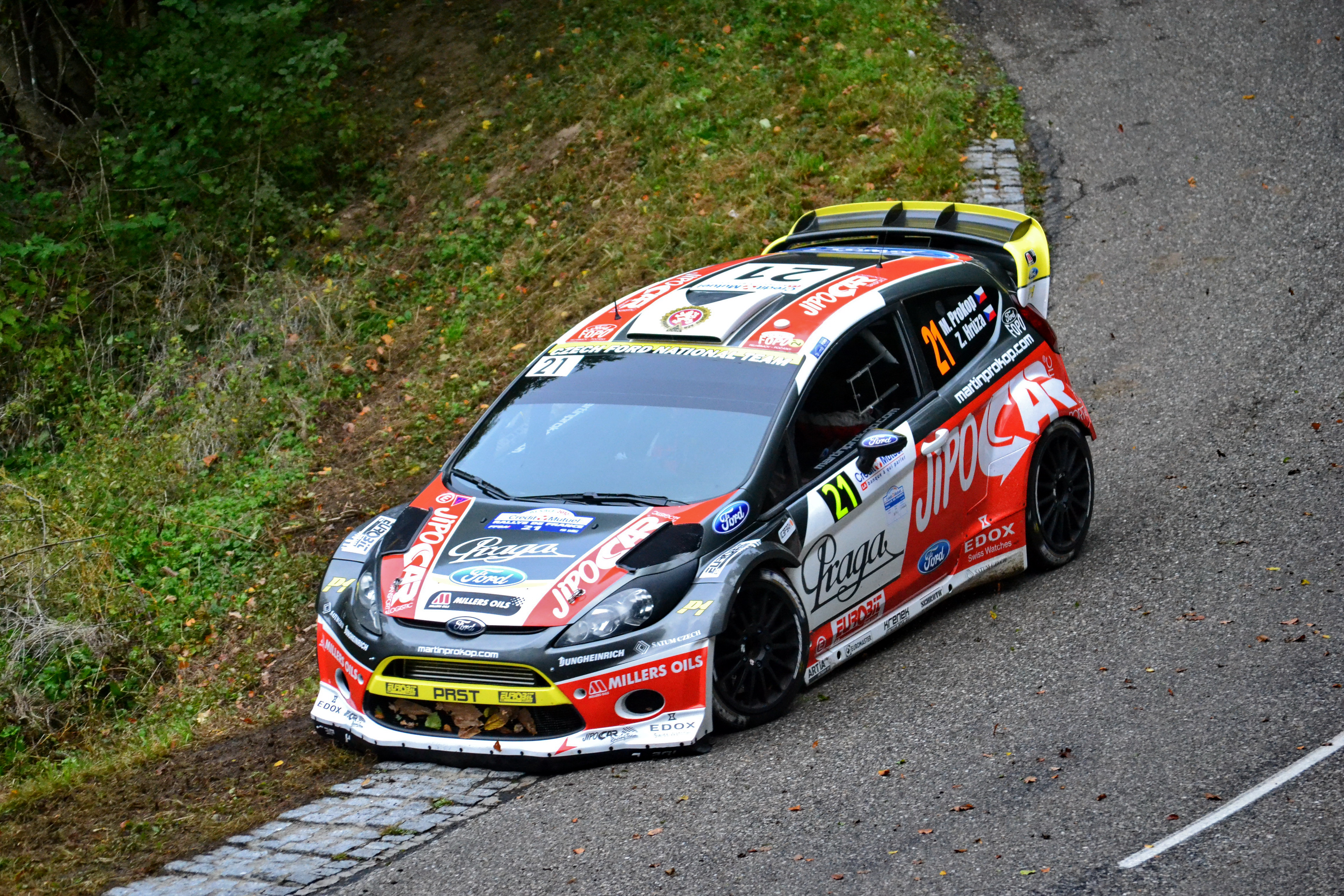 Rallye WRC France-Alsace 2012, ES2 Hohlandsbourg-Firstplan 1. Ford Fiesta WRC - Martin Prokop/Z. Hruza